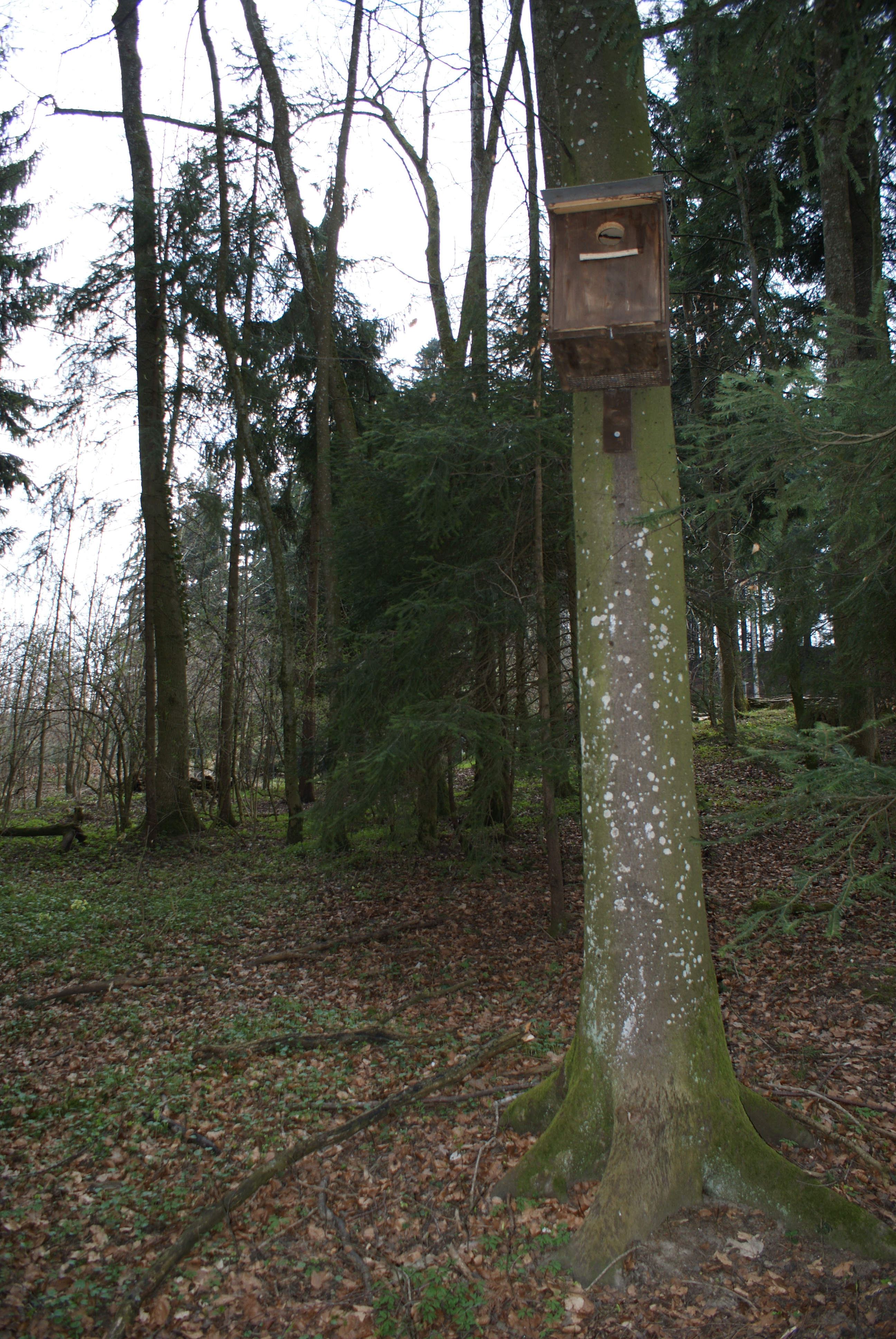 Nistkasten für den Waldkauz (Strix aluco) in einem Buchenmischwald in der Gemeinde Wädenswil, Kanton Zürich, Schweiz.